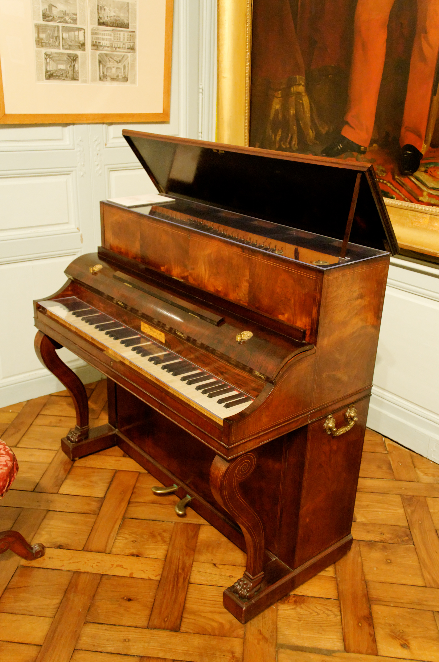 Musée Hôtel Bertrand, Châteauroux, Indre, France Pianino Pleyel ayant appartenu à Maurice Schlesinger (1798-1871)